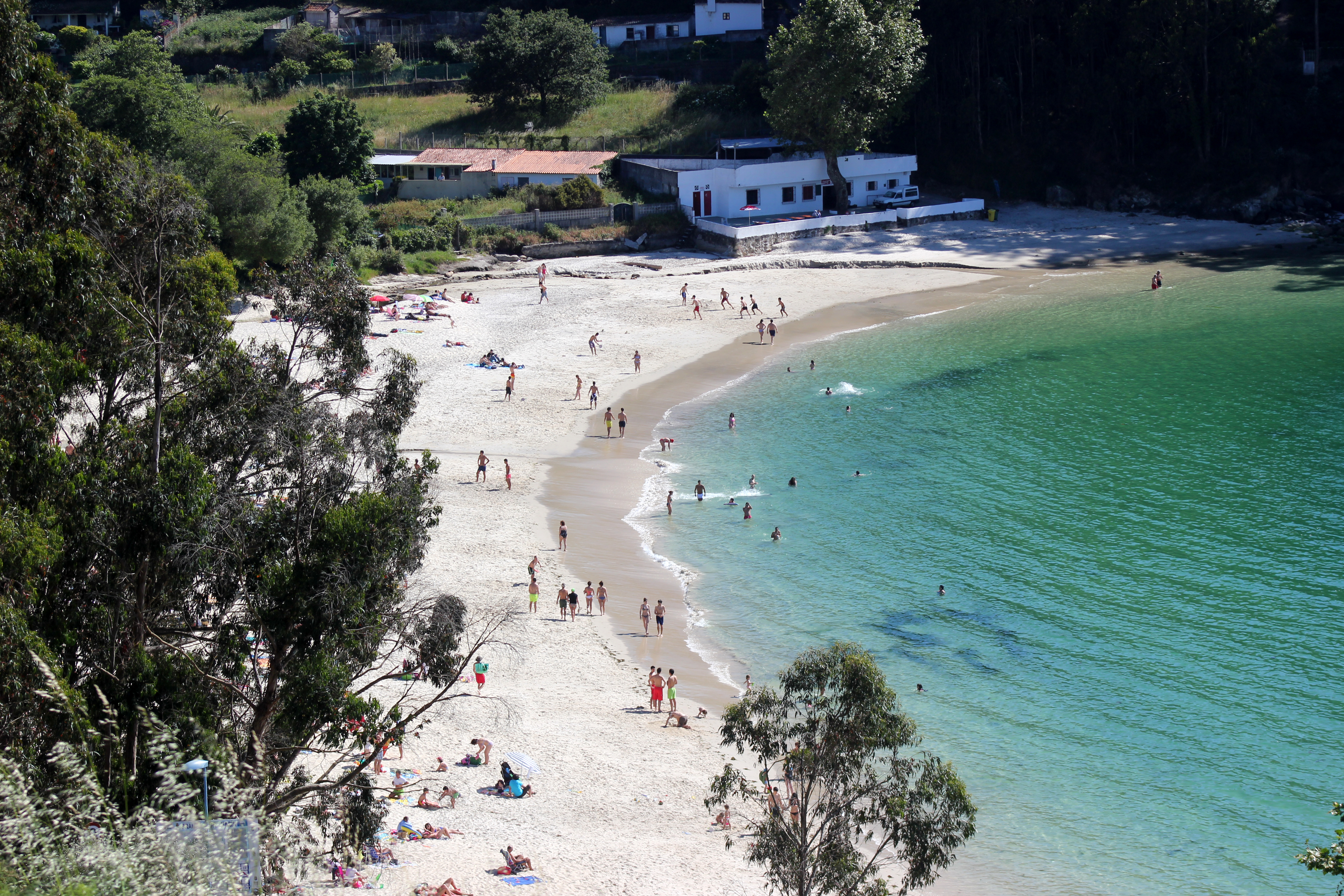 Praia de Mogor, no concello de Marín.